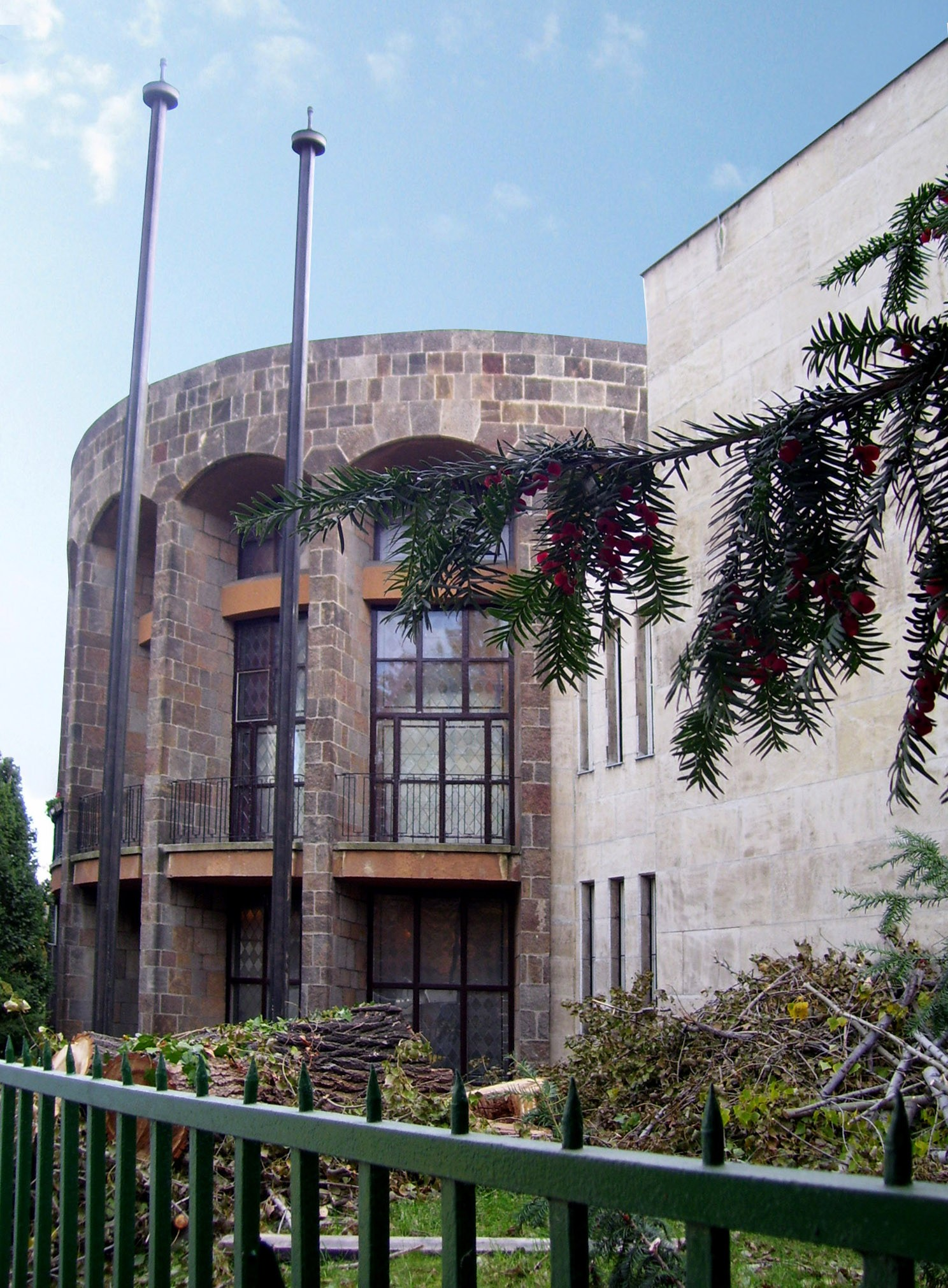 MOM kultúrház Budán.